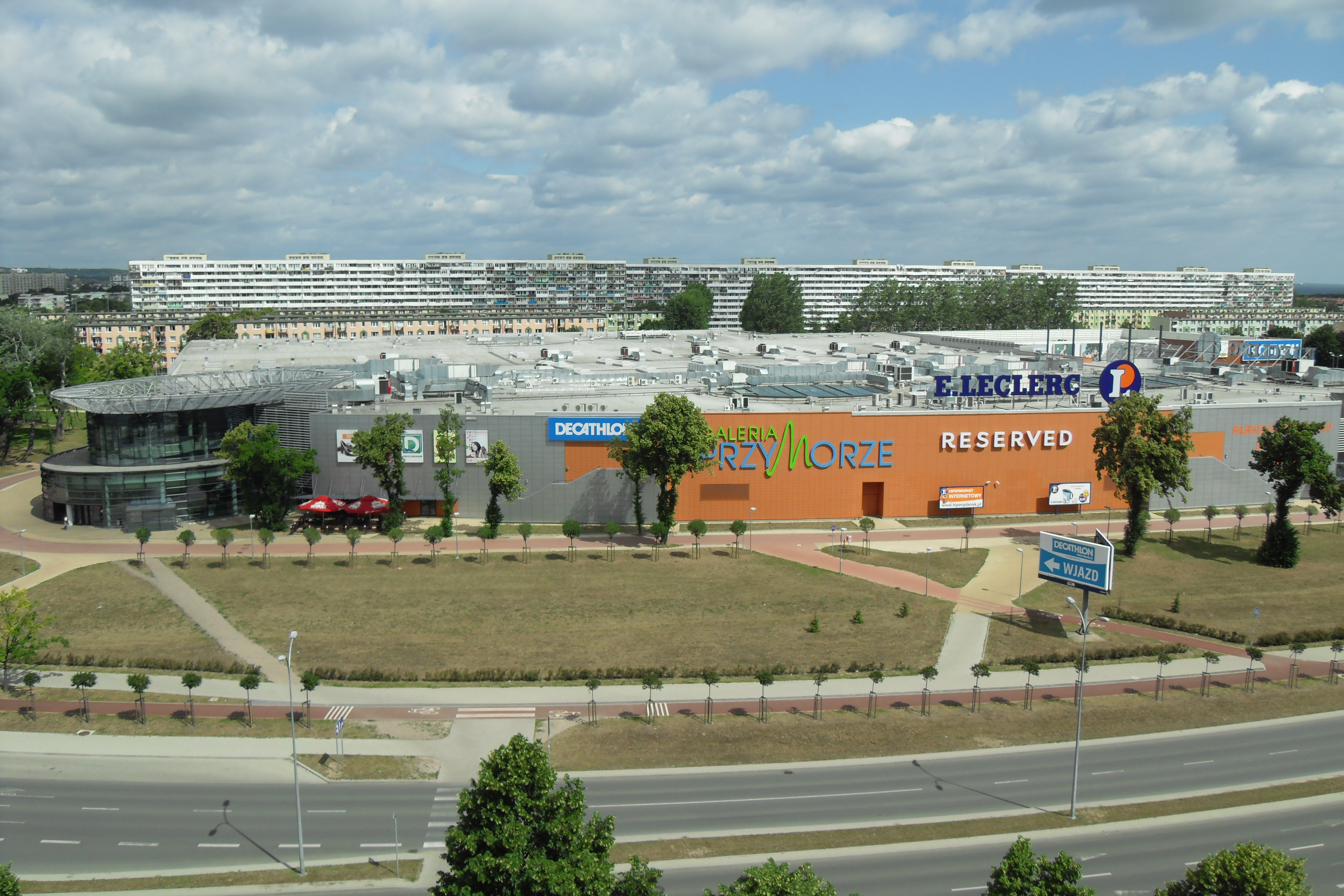 Gdańsk Przymorze, Galeria Przymorze.